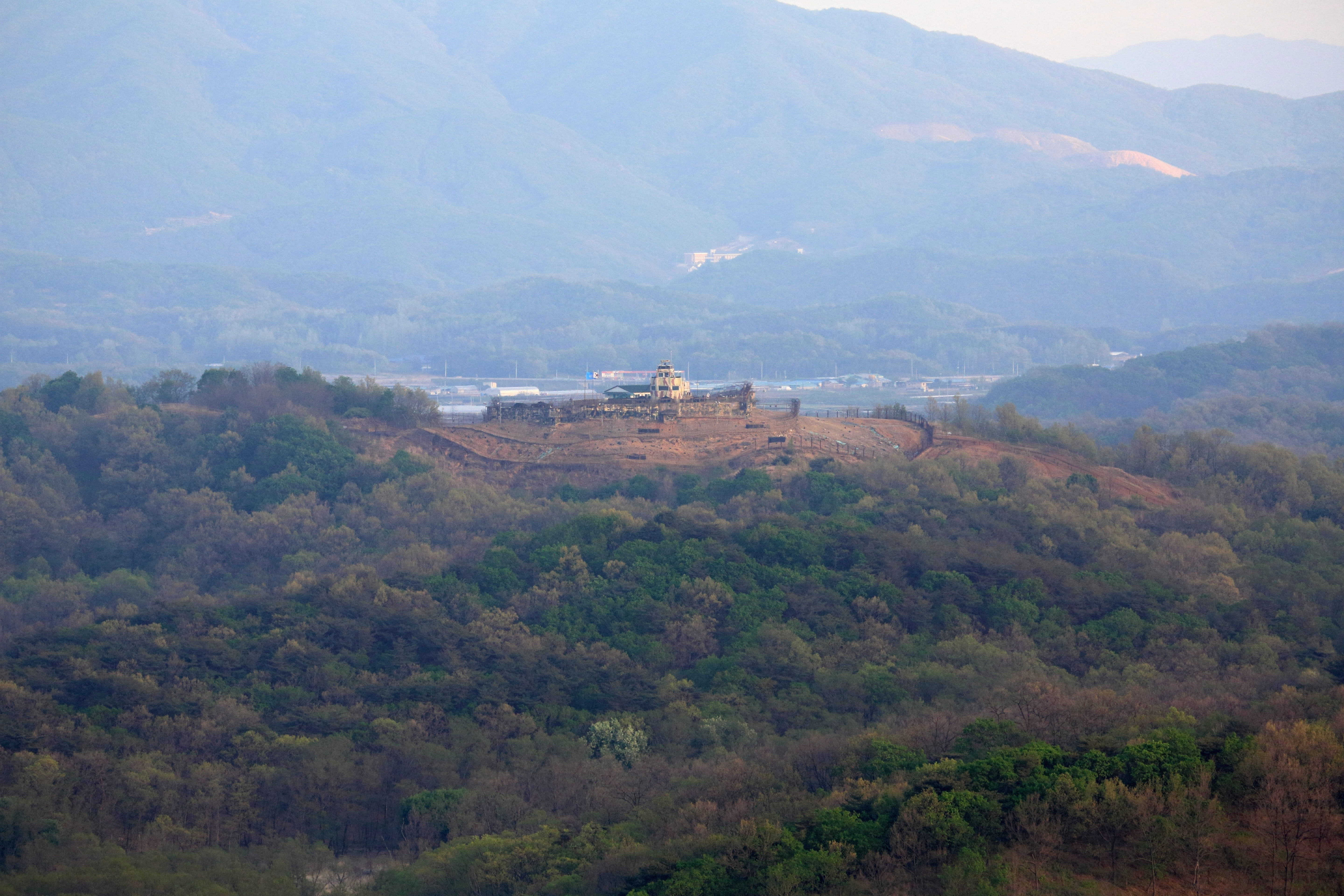 Demilitarizovaná zóna